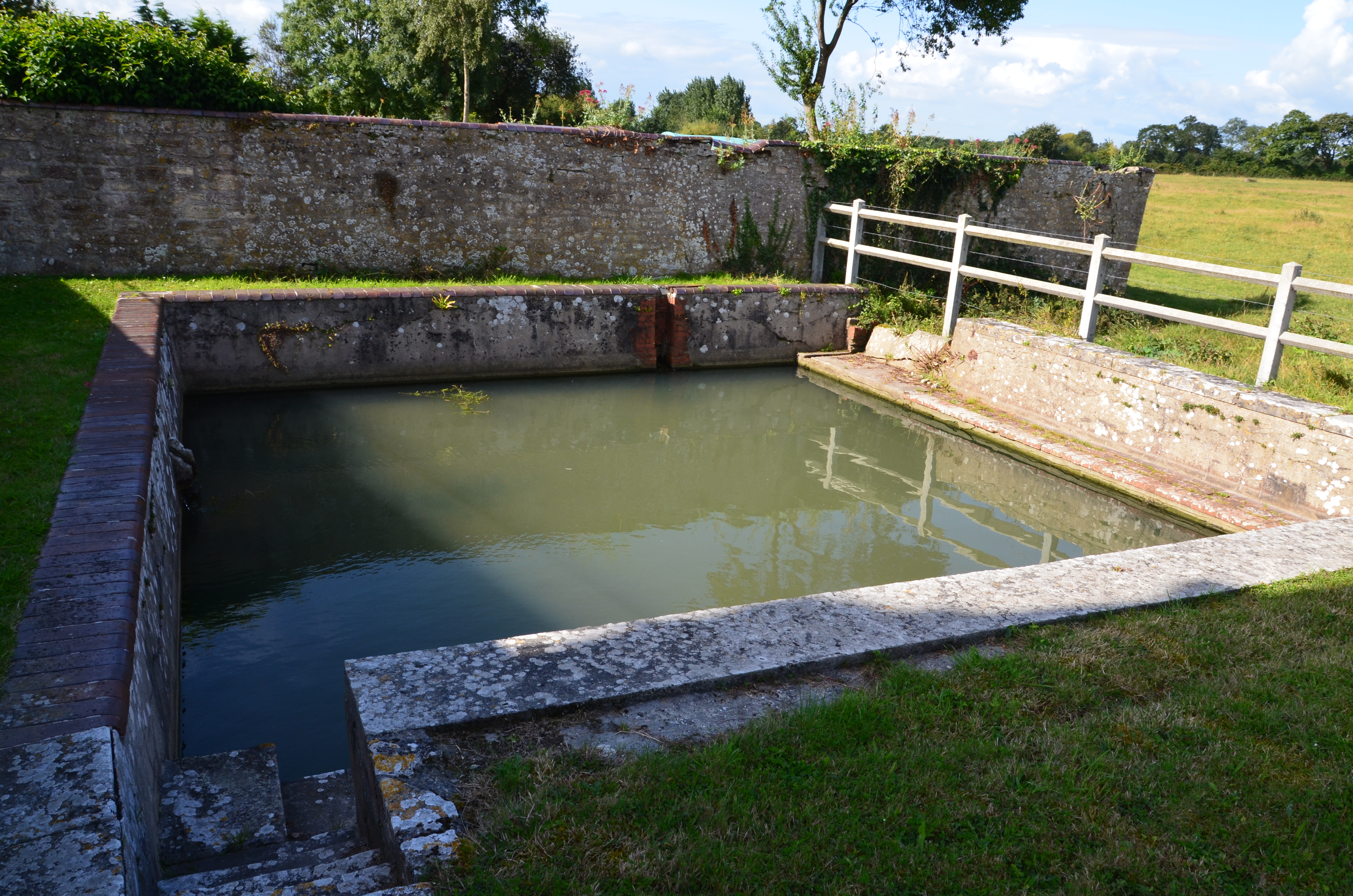 Fontaine Saint-Lubin près de l'église Saint-Germain à Saint-Germain-du-Pert.